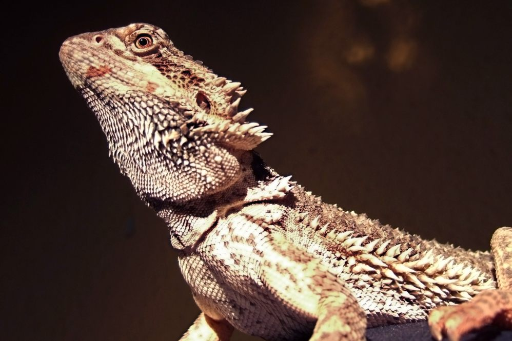 Pogona vitticeps, 10 months